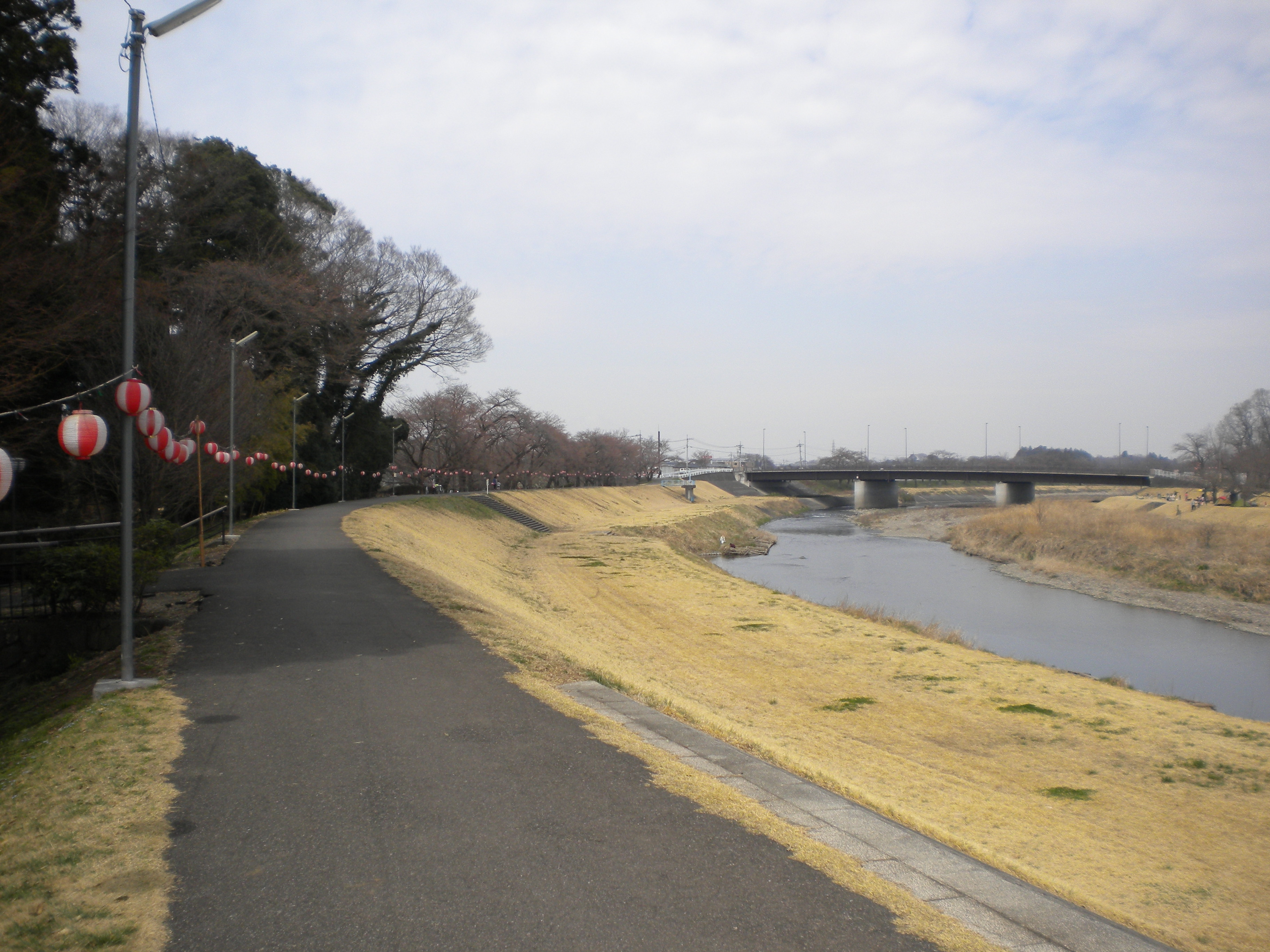 栃木県下都賀郡壬生町壬生甲 東雲公園